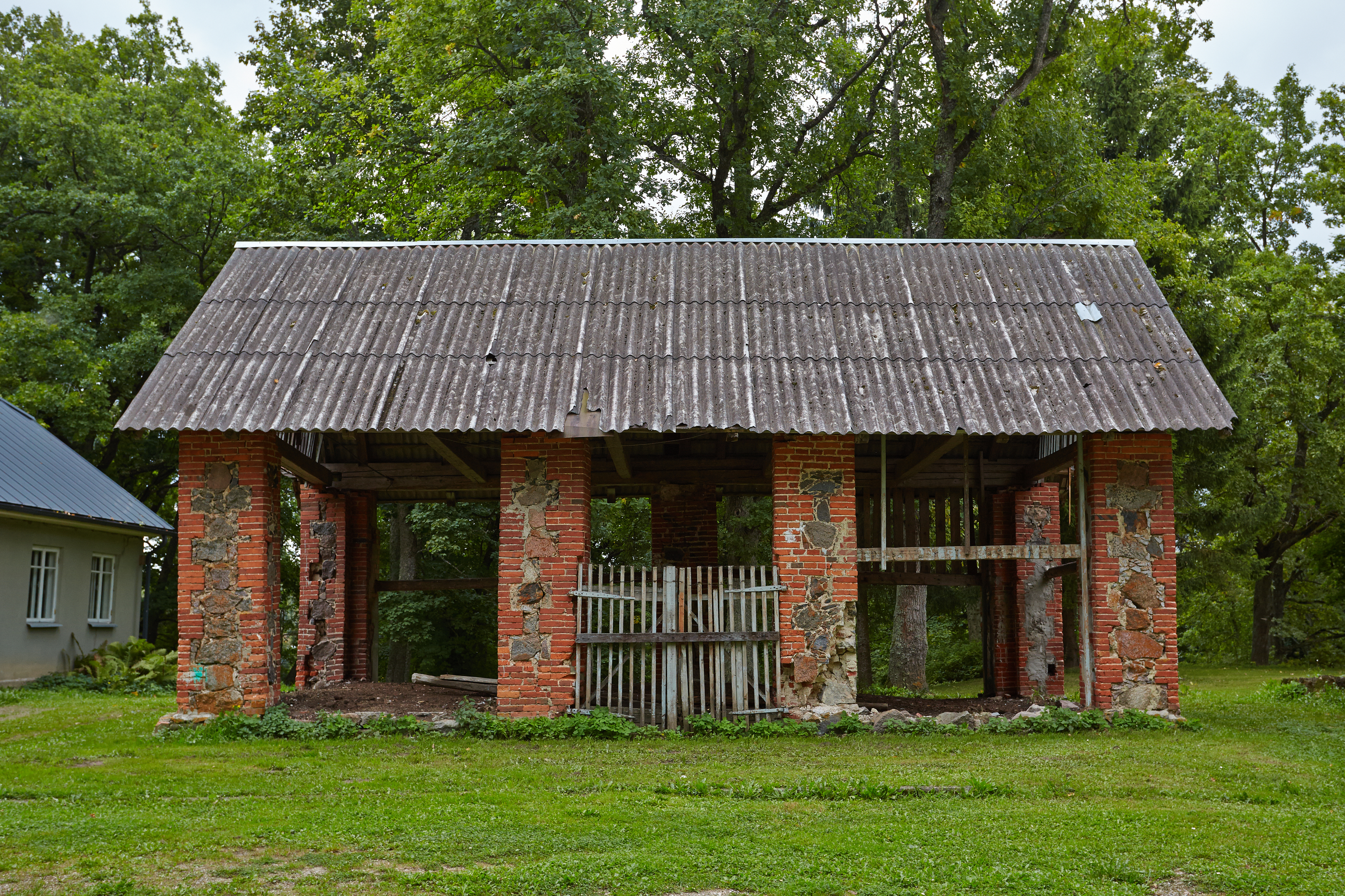 Tilsi mõisa puukuur 2013. aasta augustis.